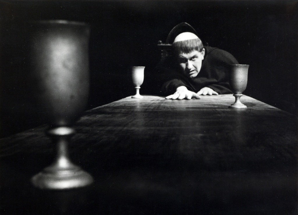 John Osborne, Luther, Drama SNG v Ljubljani. Na fotografiji: Jurij Souček (Martin).